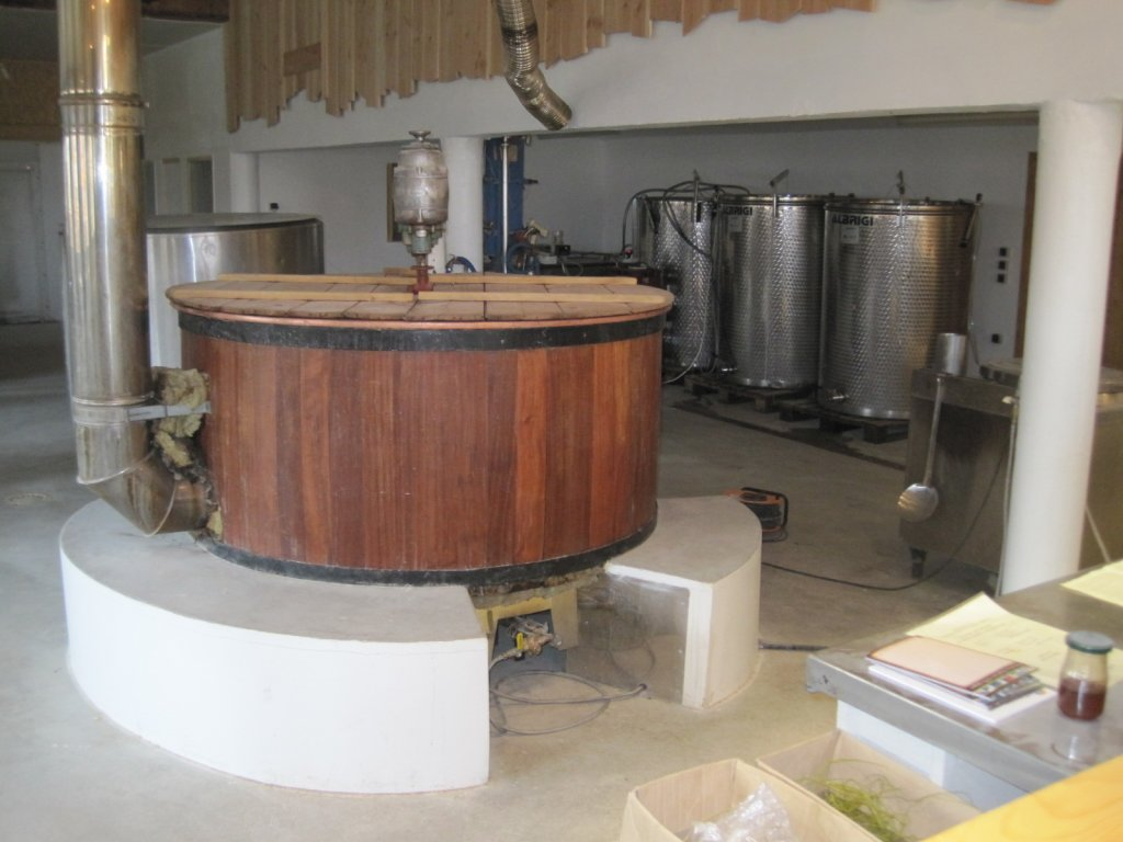 Fabrique de Bière artisanale La Franche (Jura France)